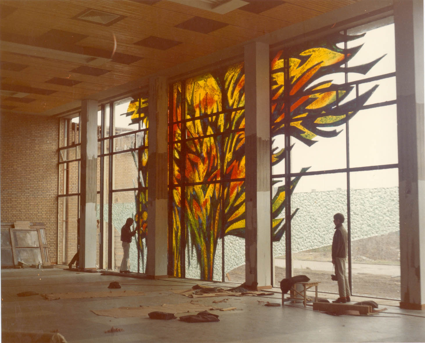 Ontwerp: Pieter Wiegersma, uitvoering: BEVO Glasindustrie